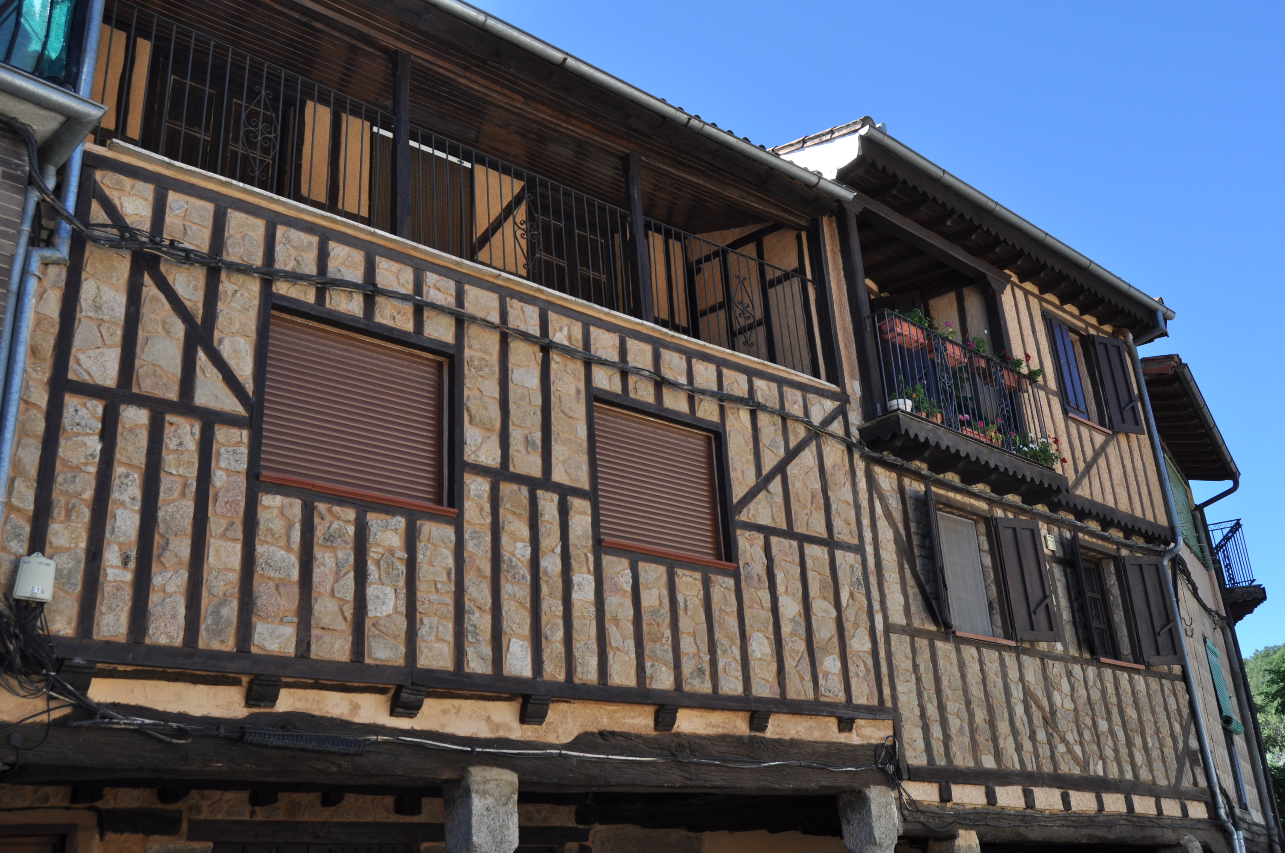 Villanueva del Conde - 016